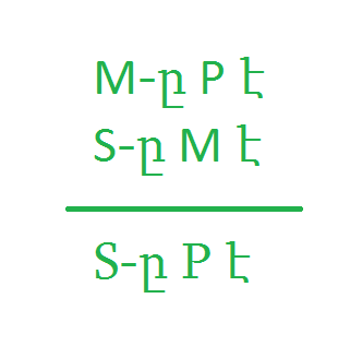 Մտածողության սխեման ըստ Ջեյմսի